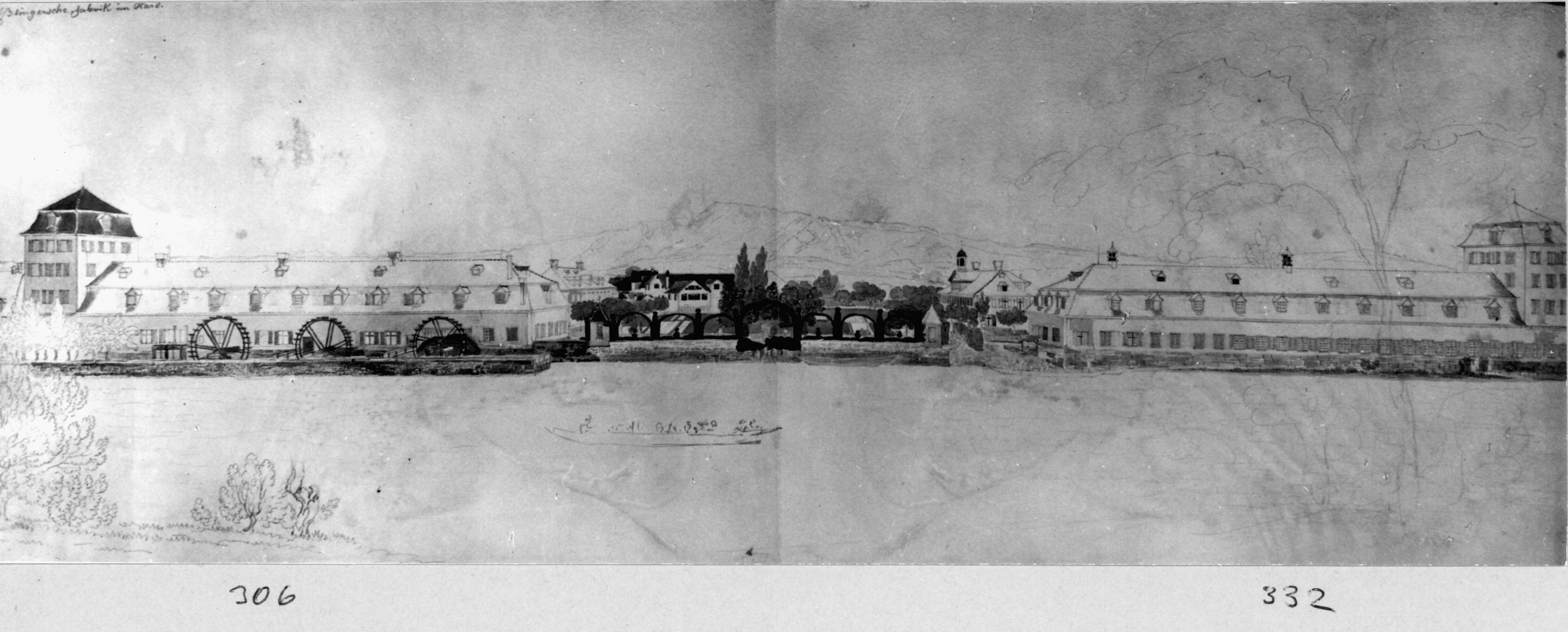 Stadtmühle (1843 gebaut) und Esslingersche Manufaktur (1812 gebaut), Sihlquai, Kreis 5, Zürich, Schweiz